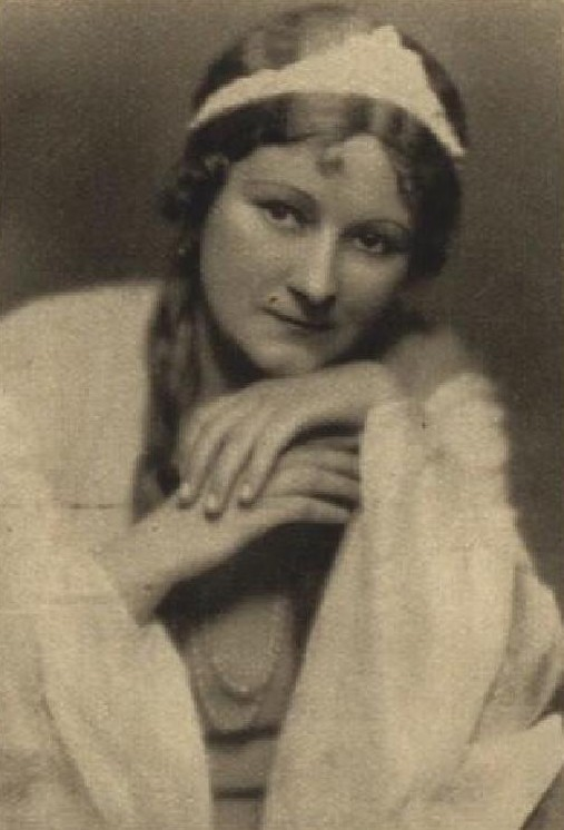 Ada Nordenová (1891-1873), česká operní pěvkyně, sopranistka